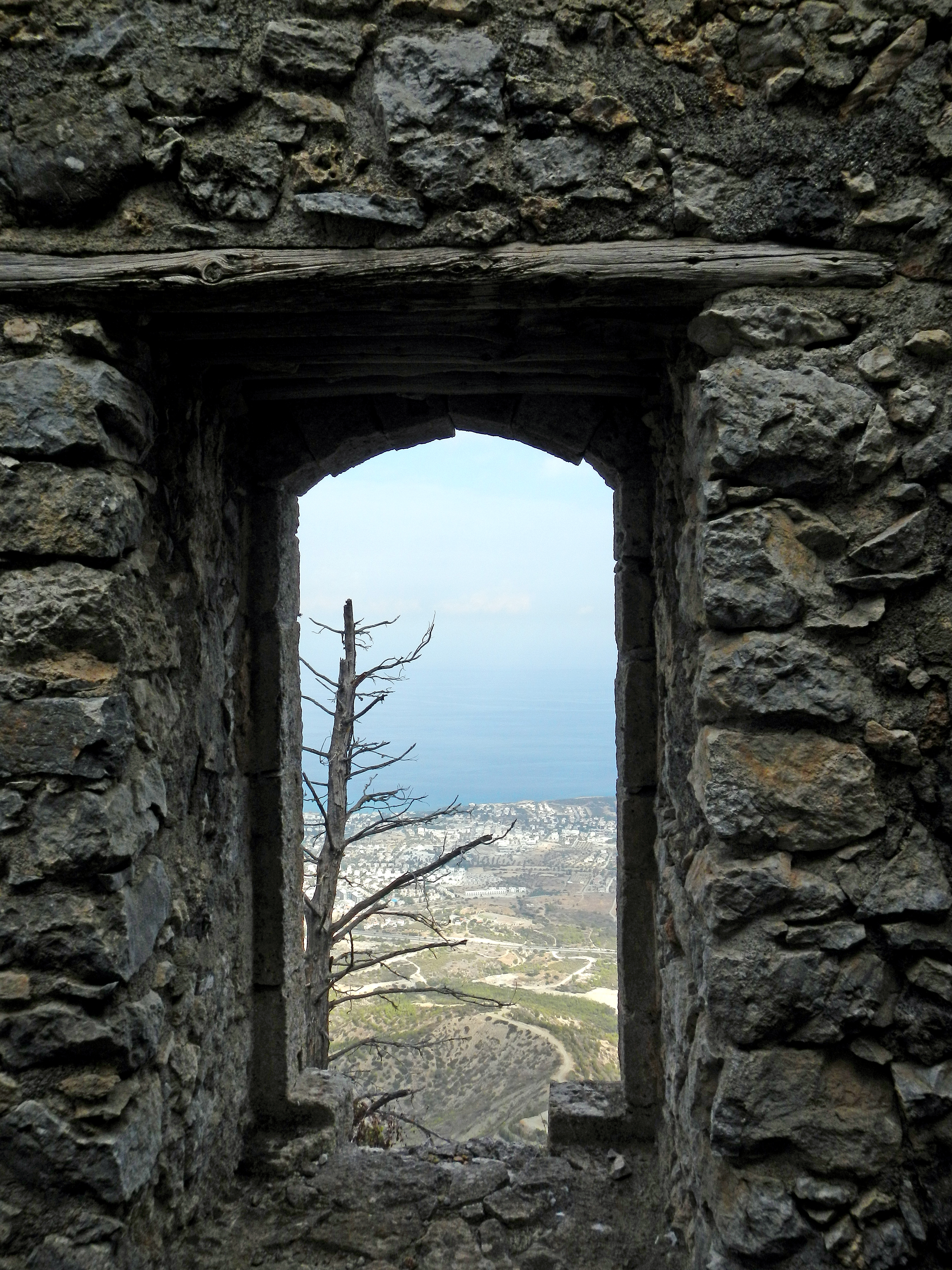 Detail (siehe auch den Dateinamen) zur Burg St. Hilarion. Diese Burg stammt aus dem 11. bis 13. Jahrhundert, ihre Teile wurden mehrfach umgebaut.